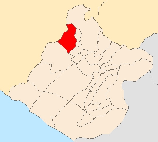 Mapa distrito Camilaca,Tacna - Perú